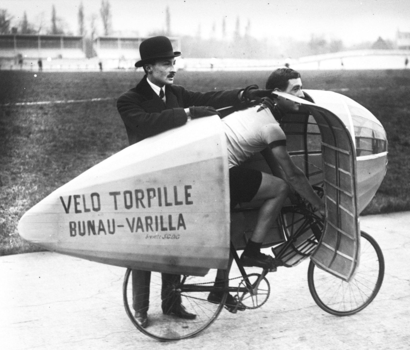 Etienne Bunau-Varilla (1890-1961) installant Marcel Berthet (1887-1953) dans son vélo torpille au Parc des Princes en 1913.